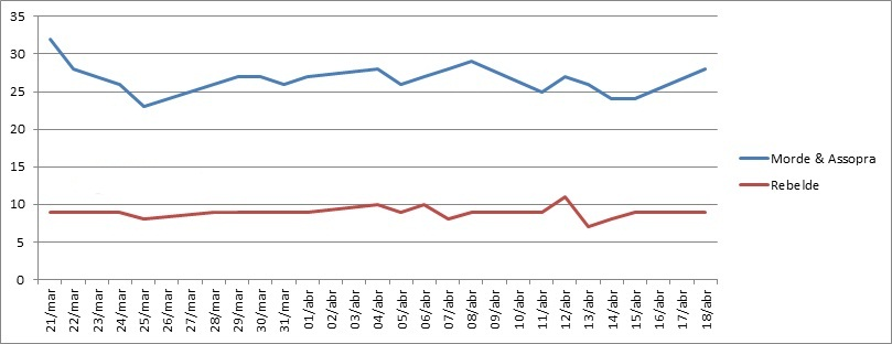 Comparativo entre as audiências obtidas pelas telenovelas brasileiras "Morde & Assopra" e "Rebelde", durante o primeiro mês de exibição de ambas. Ignora-se os sábados, quando apenas Morde & Assopra é exibida. Ambas estrearam no mesmo dia.